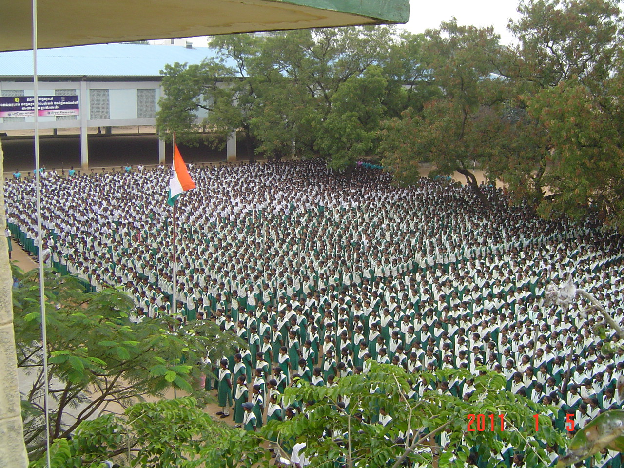 உலகளவில் மிக அதிகமான மாணவிகள் படிக்கும்(6-ம்வகுப்பு முதல் 12-ம் வகுப்பு வரை) திருப்பூர்(இந்தியா)ஜெய்வாபாய் மாநகராட்சிப்பெண்கள் மேல் நிலைப்பள்ளியின் காலை வழிபாட்டுக்கூட்டத்தின் ஒரு பகுதியின் புகைப்படம்.